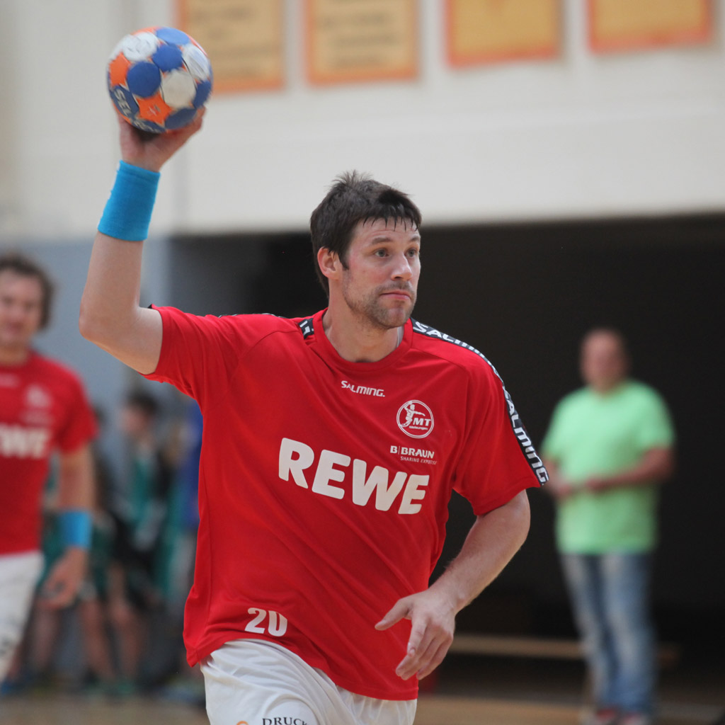 Momir Rnić, Handballspieler der MT Melsungen. Fotografiert am 14. Juli 2015 in der Heppenheimer Nibelungenhalle beim Maisch Cup.